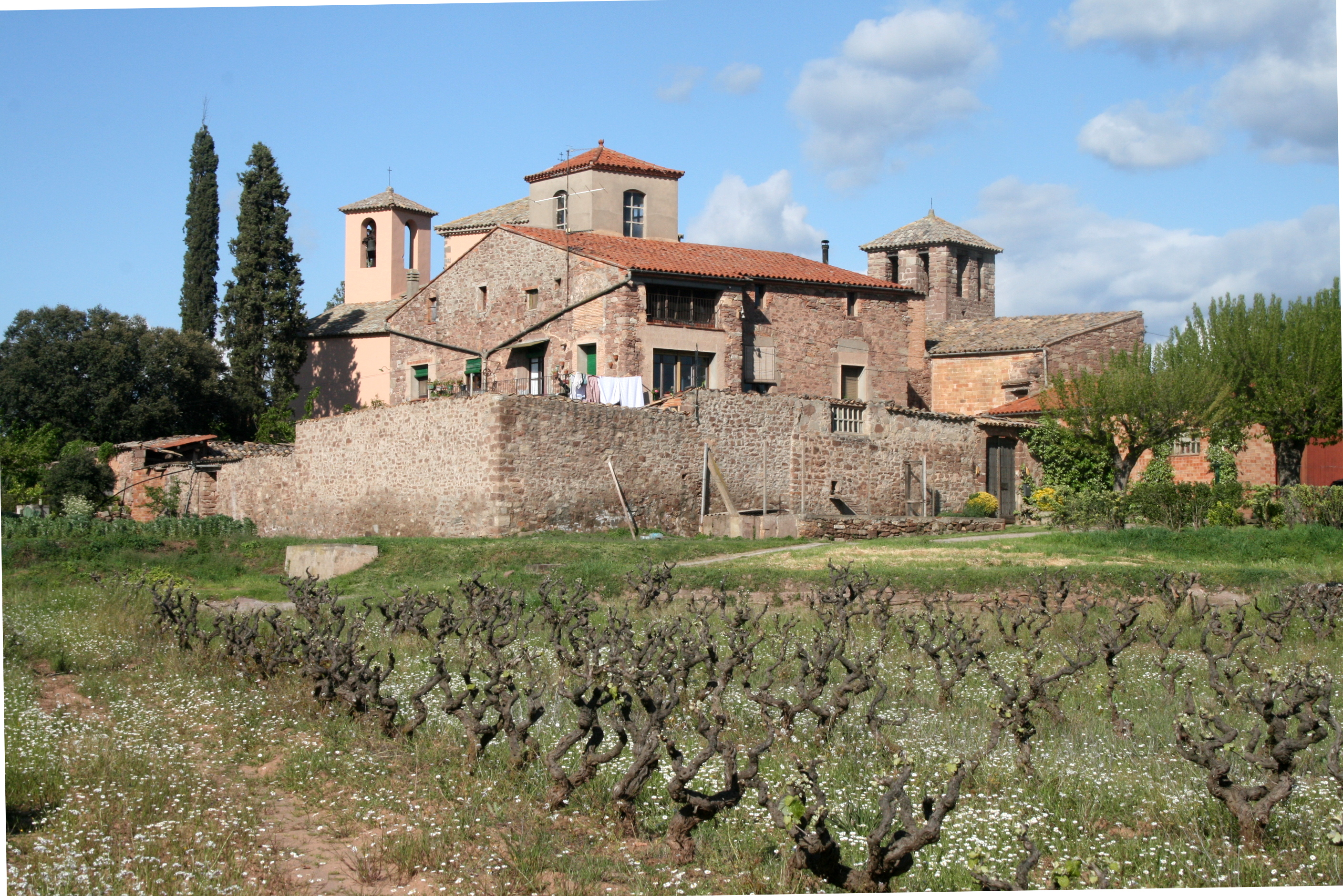 Santa Anna de Claret